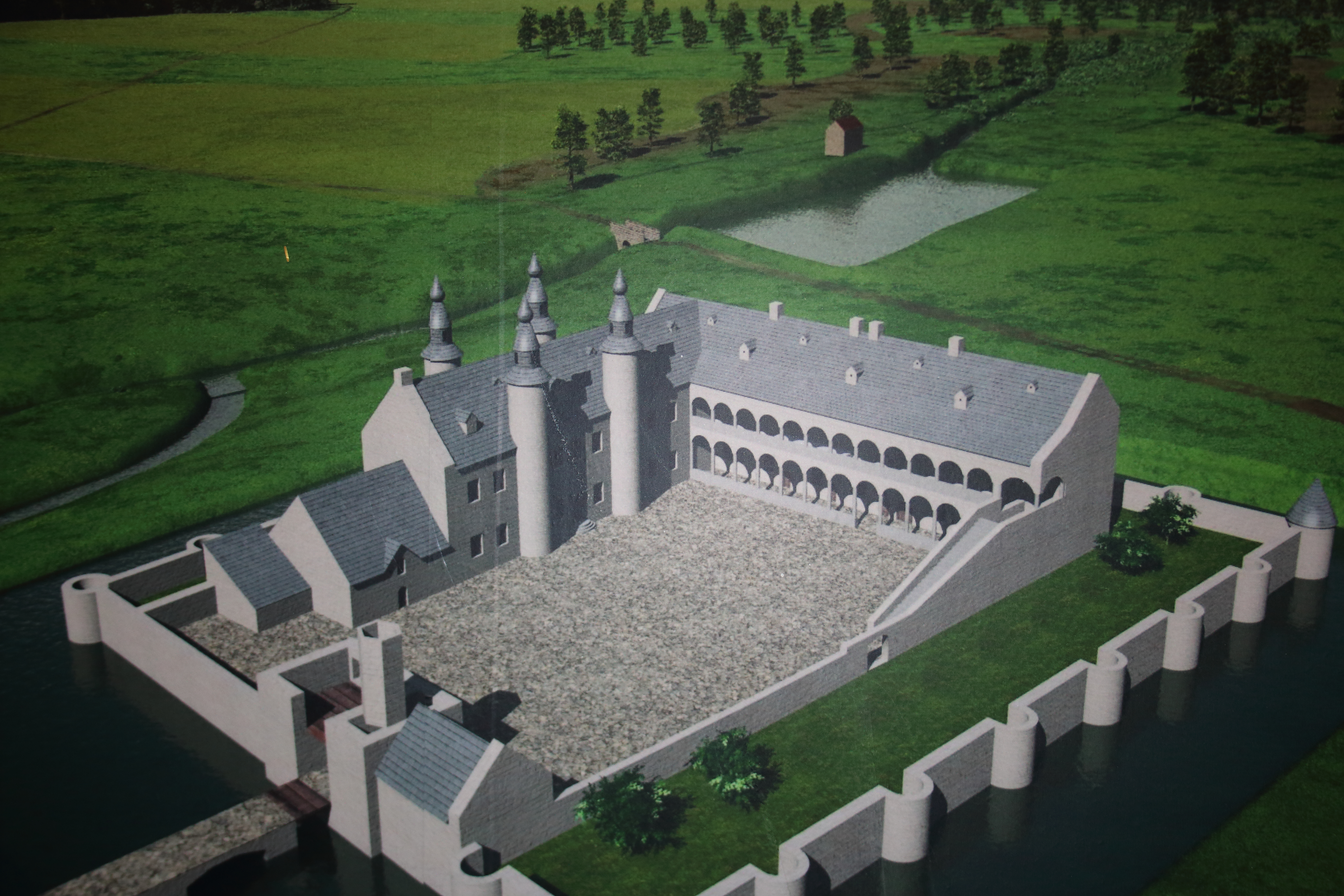 reconstructie Egmontkasteel Zottegem 16de eeuw, tentoonstelling 'Graven in Vryheydt' Provinciaal Archeocentrum AVE Velzeke